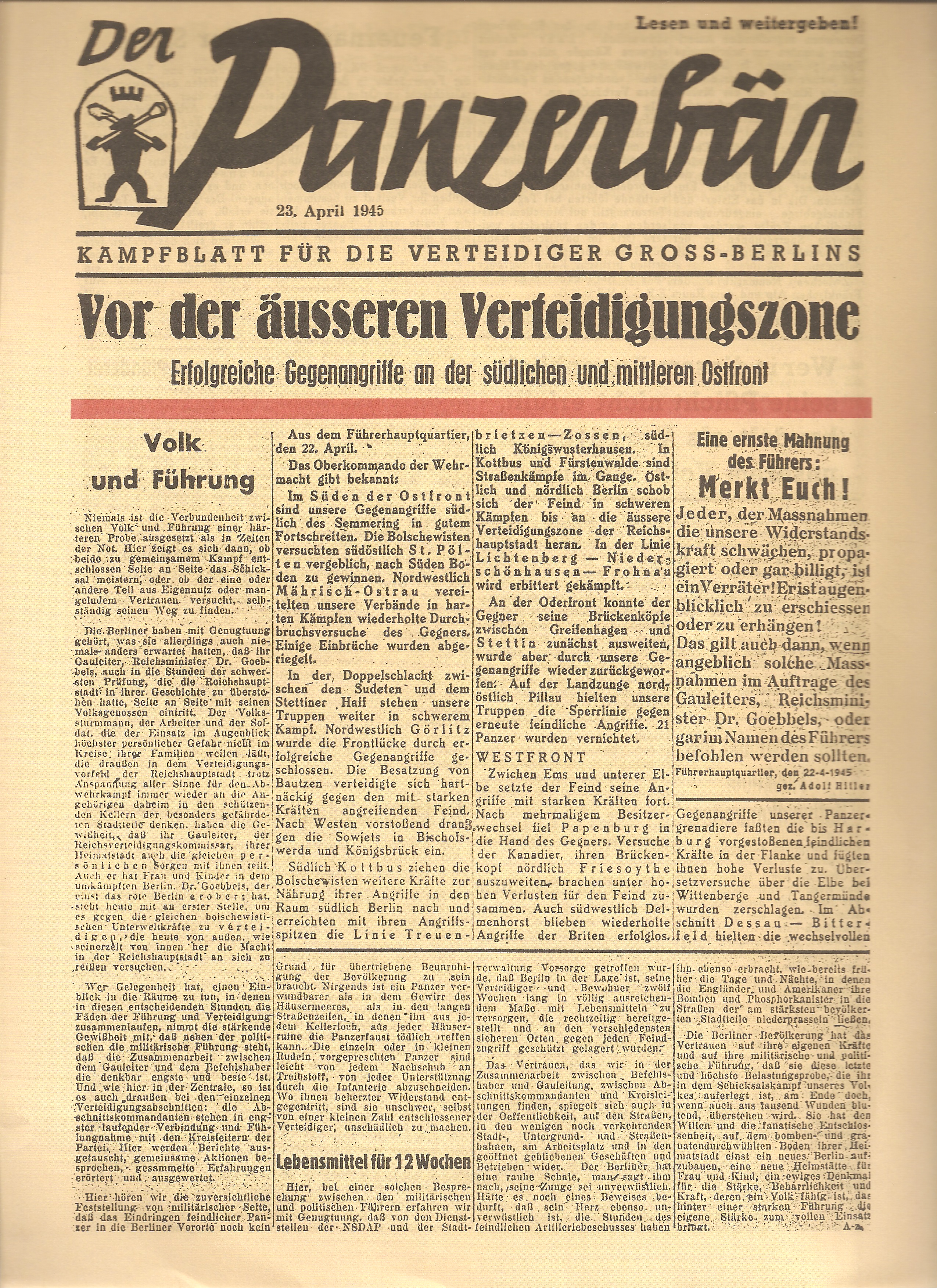 Zeitung für die Verteidiger Berlins. Berlin, 23. April 1945, page 1